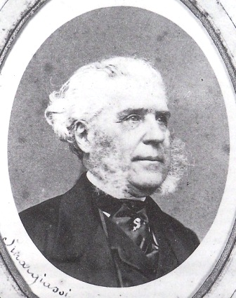 ritratto